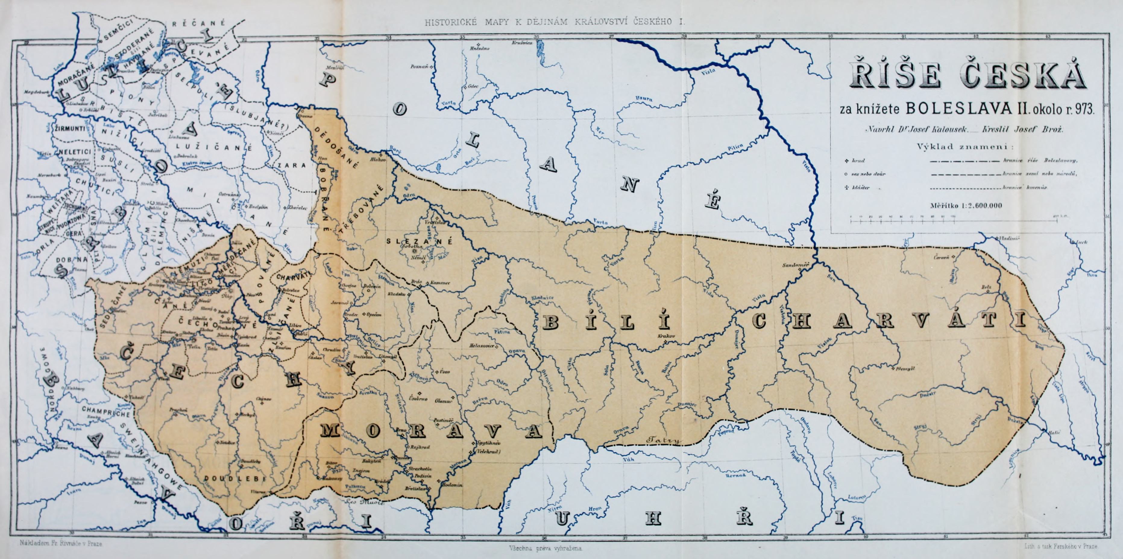 Říše česká za knížete Boleslava II. okolo roku 973, historická mapa